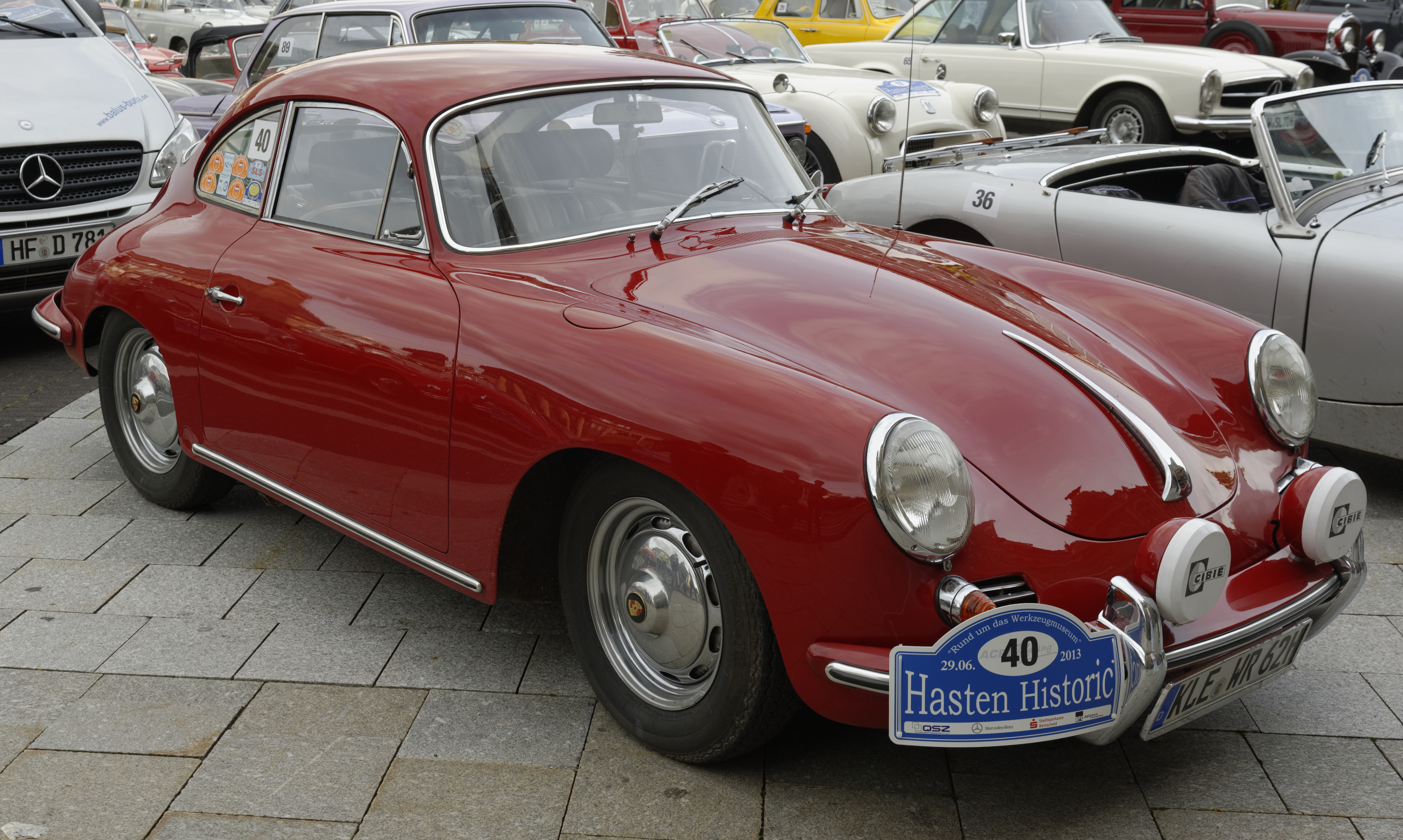 Oldtimershow in Remscheid Juni 2013